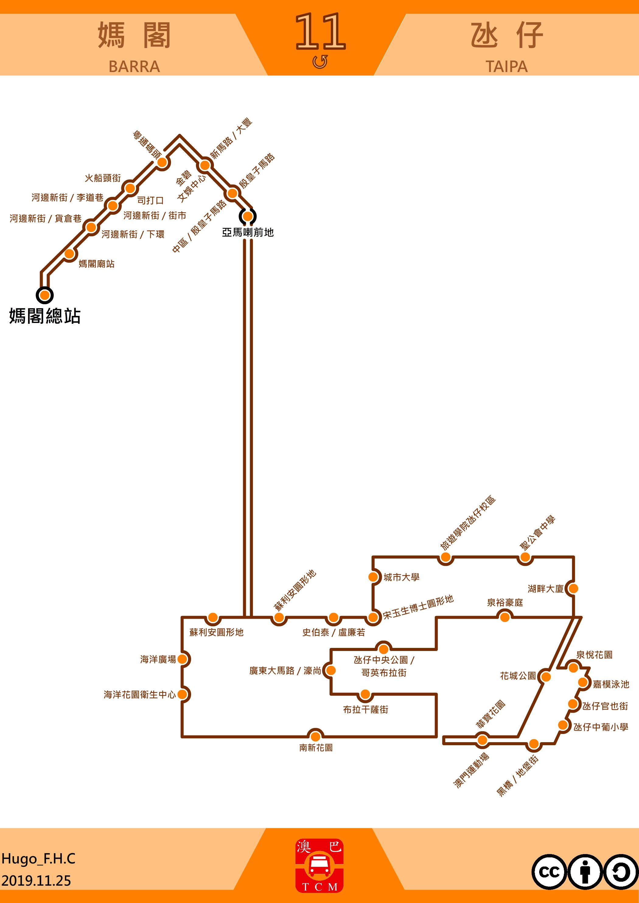 澳門巴士11走線圖